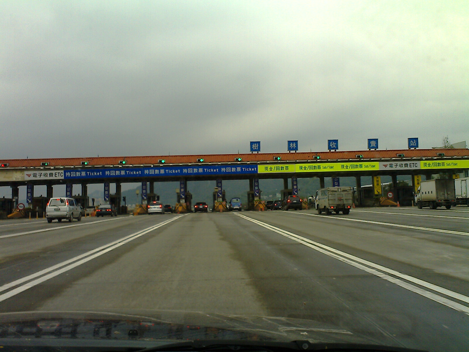 中山高速公路樹林收費站。